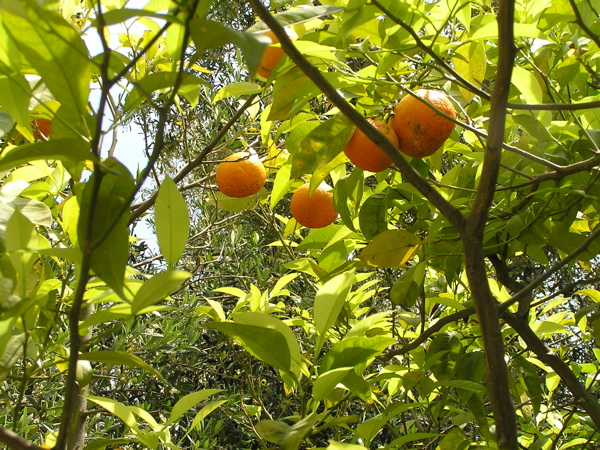 Bitterorange, Citrus aurantium L., Pomeranzen, Giardini Hanbury in Ventimiglia, Italia